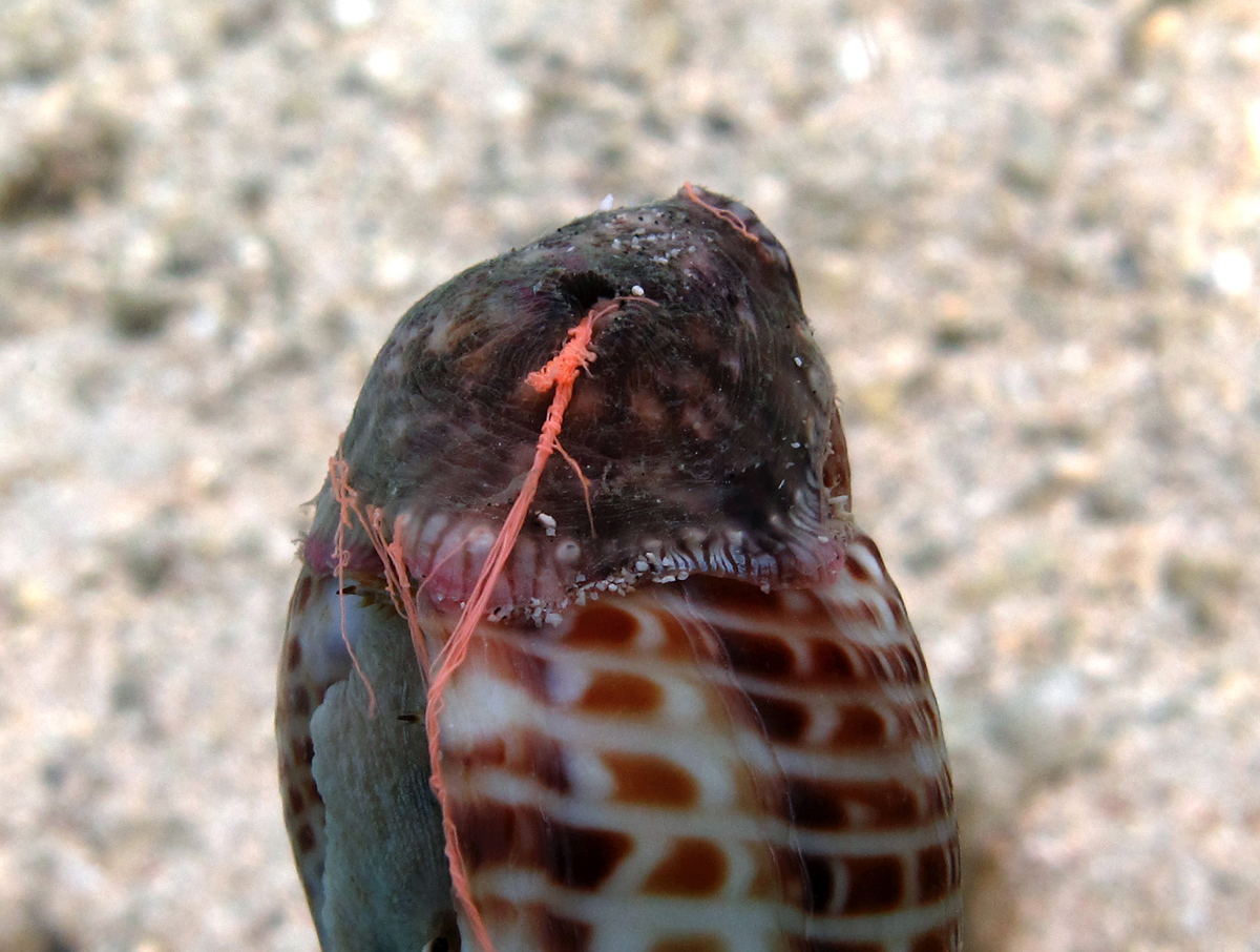 Anémone des Bernard-l'hermite (Calliactis polypus), avec des aconties, à la Réunion.